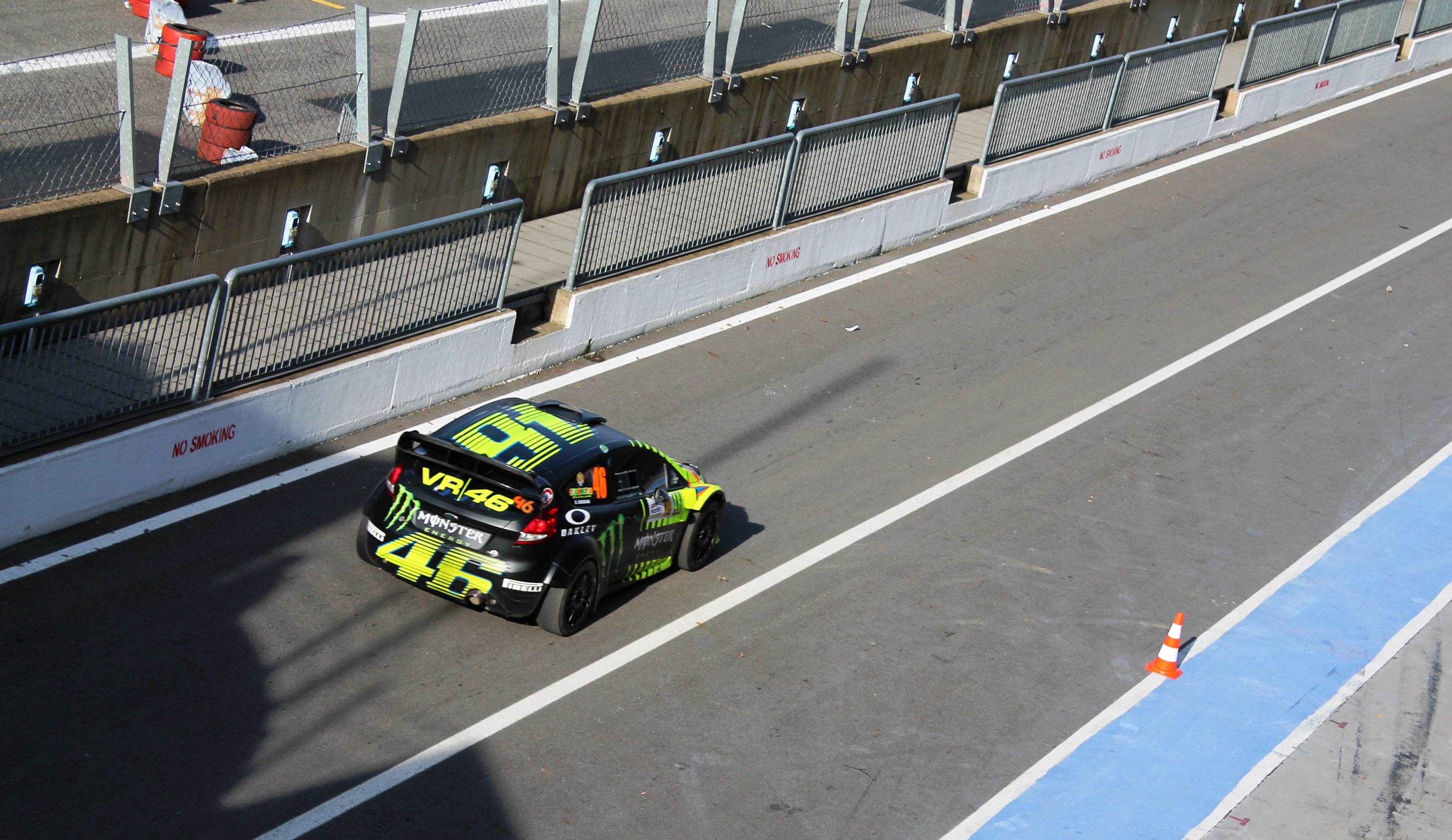 Valentino Rossi in coppia con Cassina al Rally di Monza del 2013 - 1